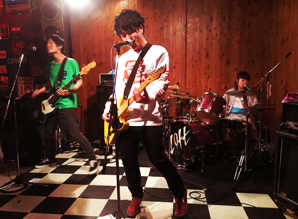 3SET-BOB 新宿LOFT